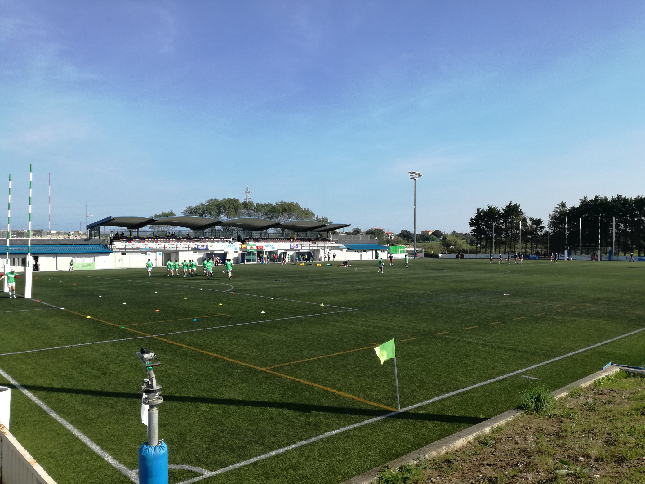 Campo municipal San Román de la Llanilla, Santander.